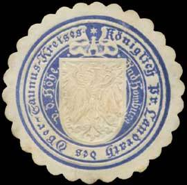 Sealing stamp Title: K.Pr. Landrath des Ober-Taunus-Kreises Description: blau, weiß, geprägt Place: Bad Homburg size: 4 cm